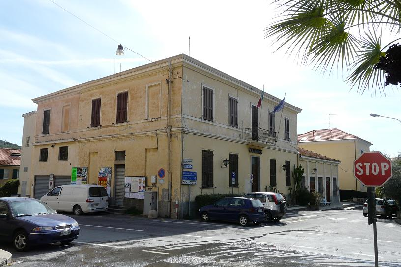 Municipio di San Bartolomeo al Mare, Liguria, Italia